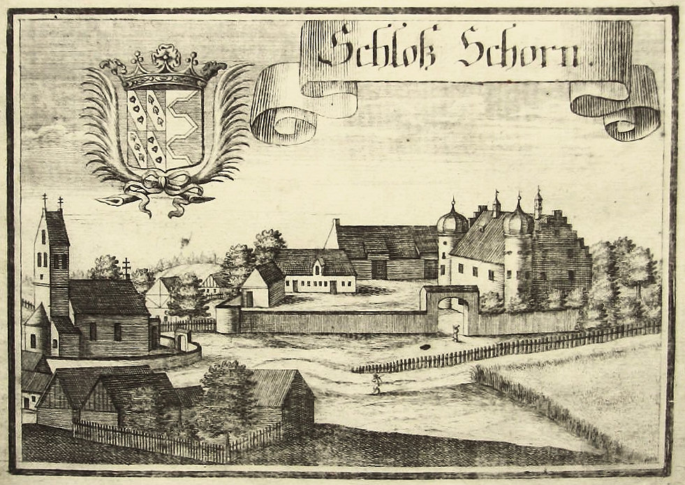 Kupferstich mit einer Abbildung des bayerischen Schlosses Schorn, aus: Historico-topographica descriptio Bavariae